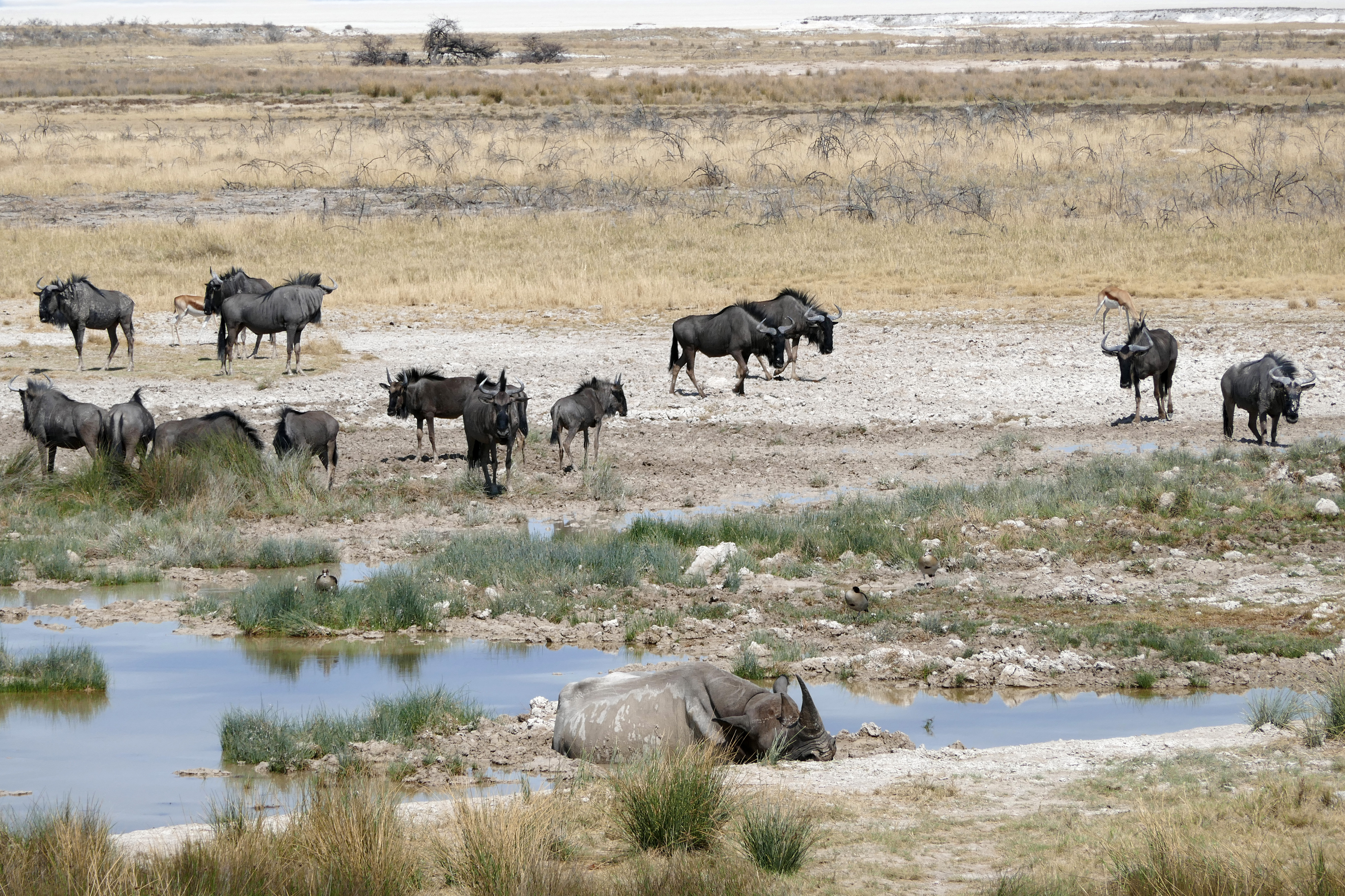 Gnous et rhinocéros dans le parc national d'Etosha (Namibie).